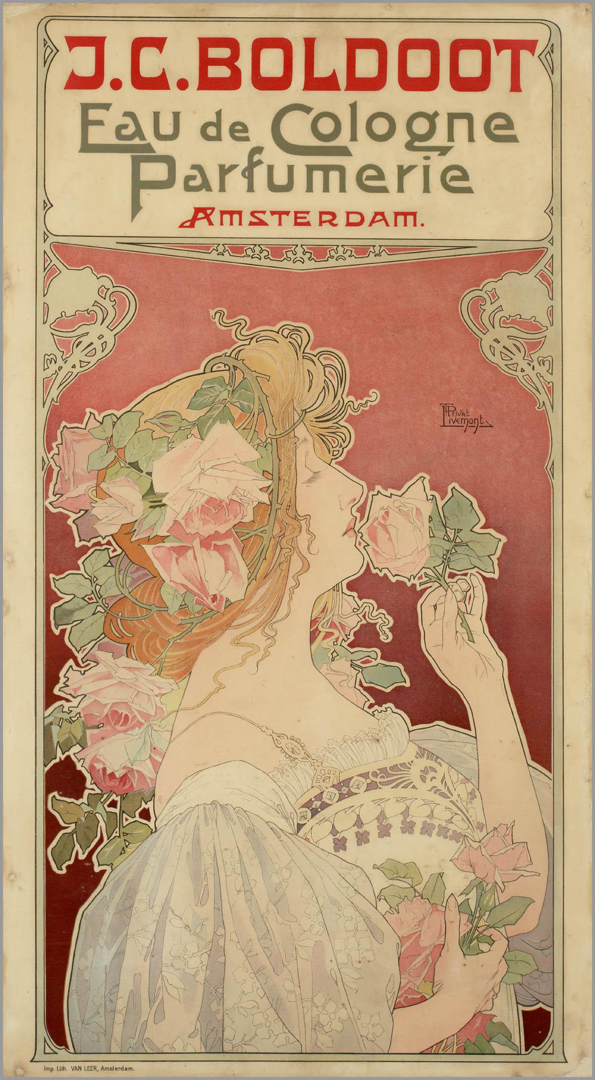 Affiche: J.C. Boldoot, Eau de Cologne Parfumerie, Amsterdam